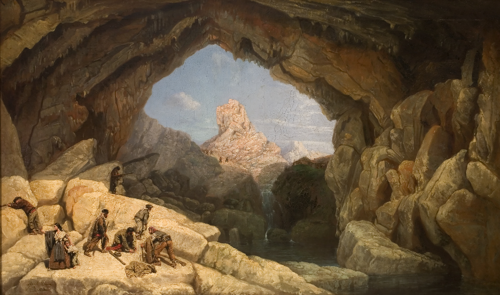 La obra representa la Cueva del Gato, situada en la provincia de Málaga, (Spain).